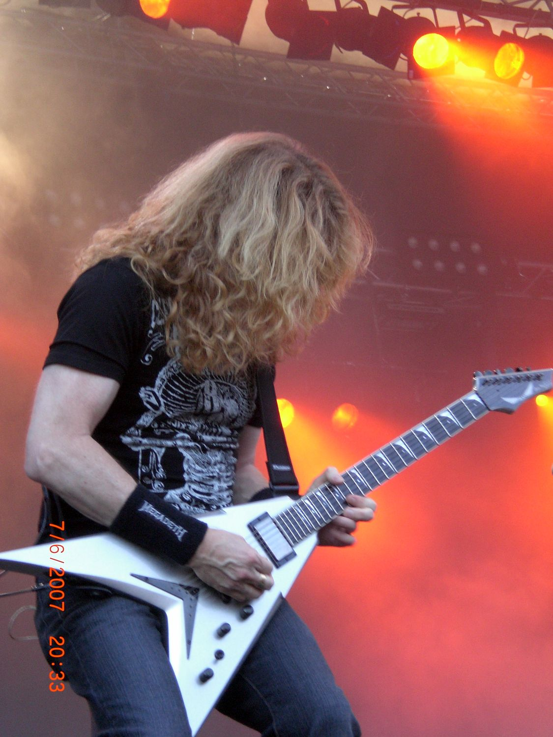 Description